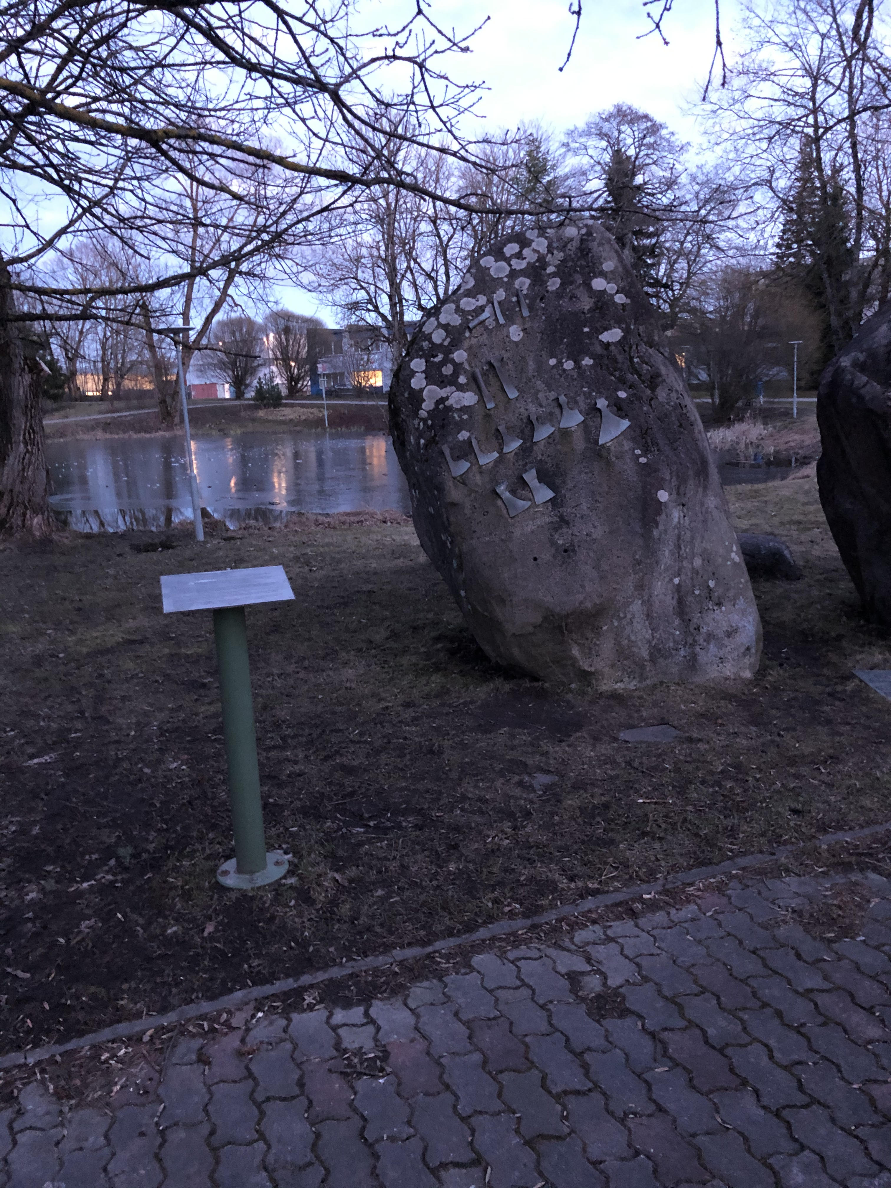 Eesti esimese rauasulatuskoha mälestusmärk